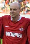 Viktor Onopko, Russian footballer.